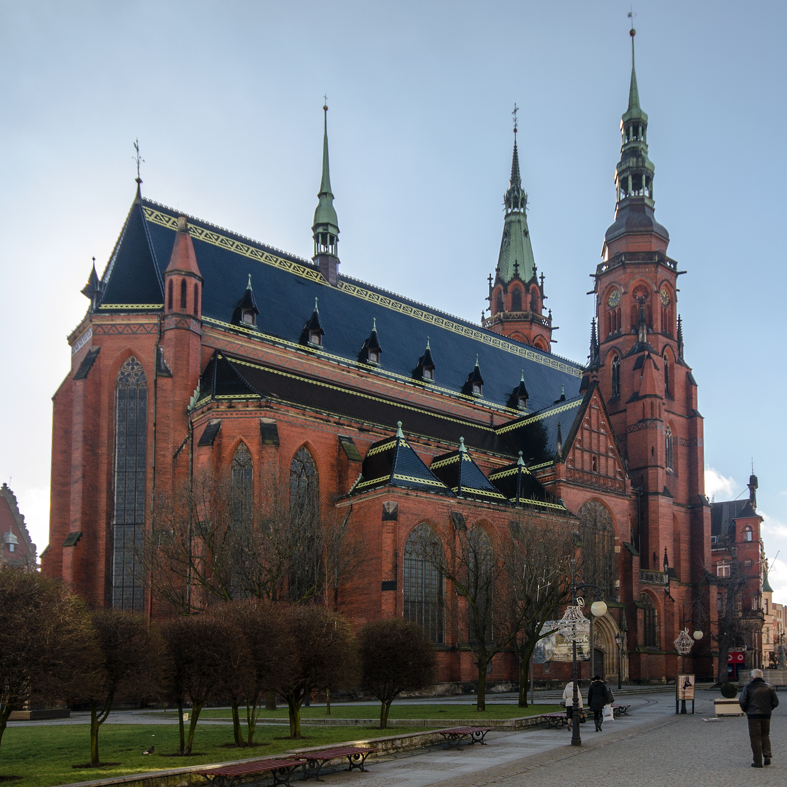 Legnica, kościół par. p.w. śś. Piotra i Pawła, ob. katedra, 1333-1390, 1863-1894